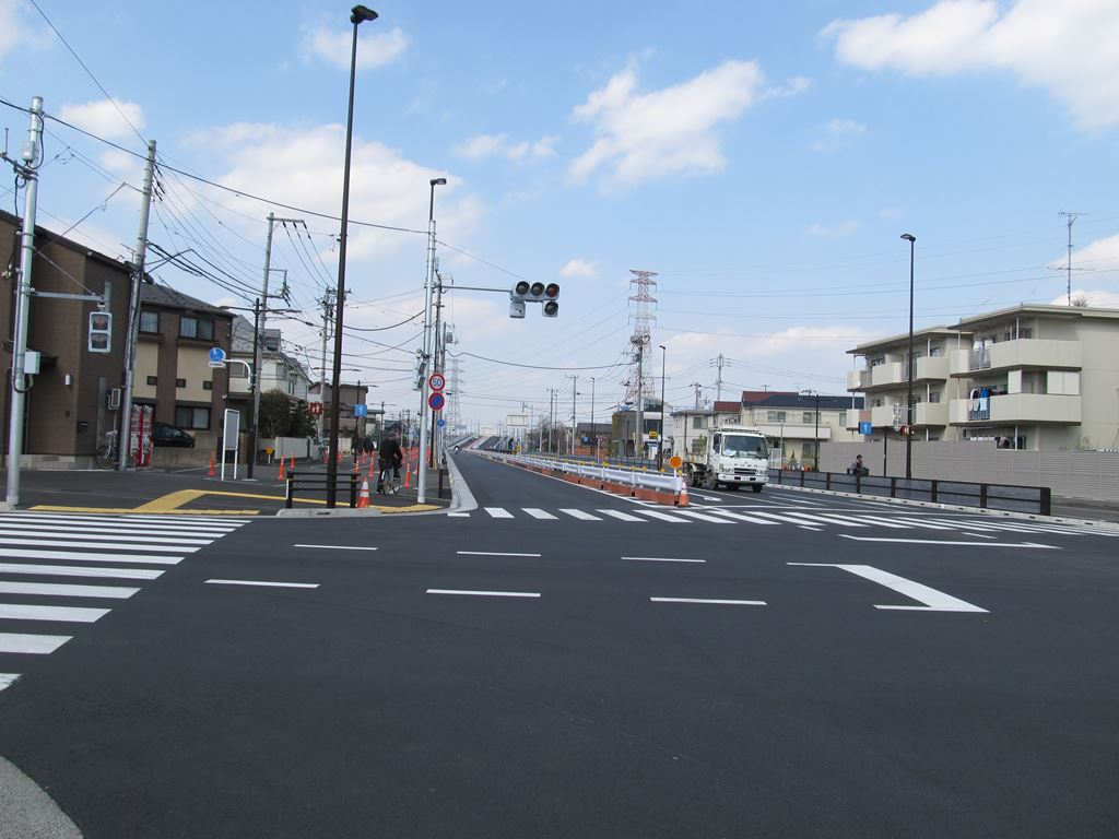 多摩南北道路3号線（府中所沢線および鎌倉街道線）